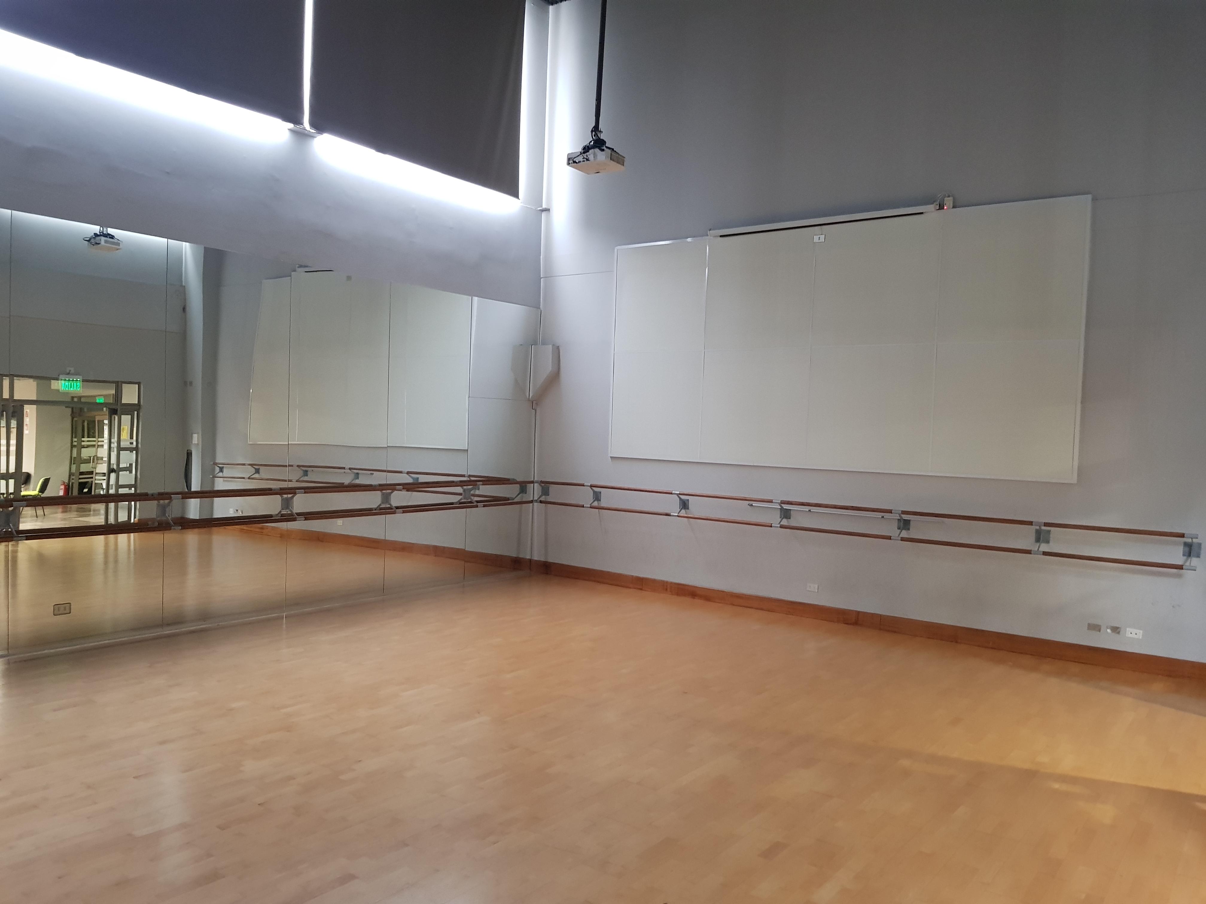 Fotografía de la sala de danza del Centro Cultural Teatro Serrano de la Provincia de Melipilla, Región Metropolitana.